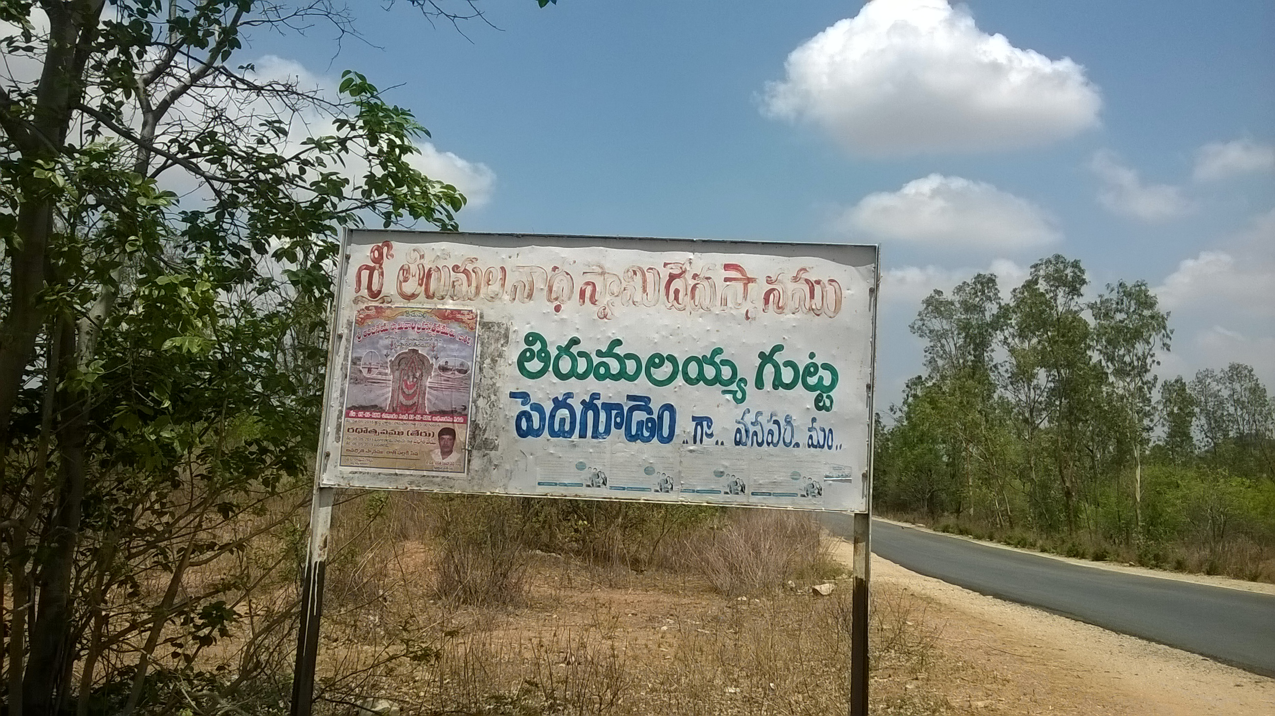 పెద్ద గూడెం సూచి